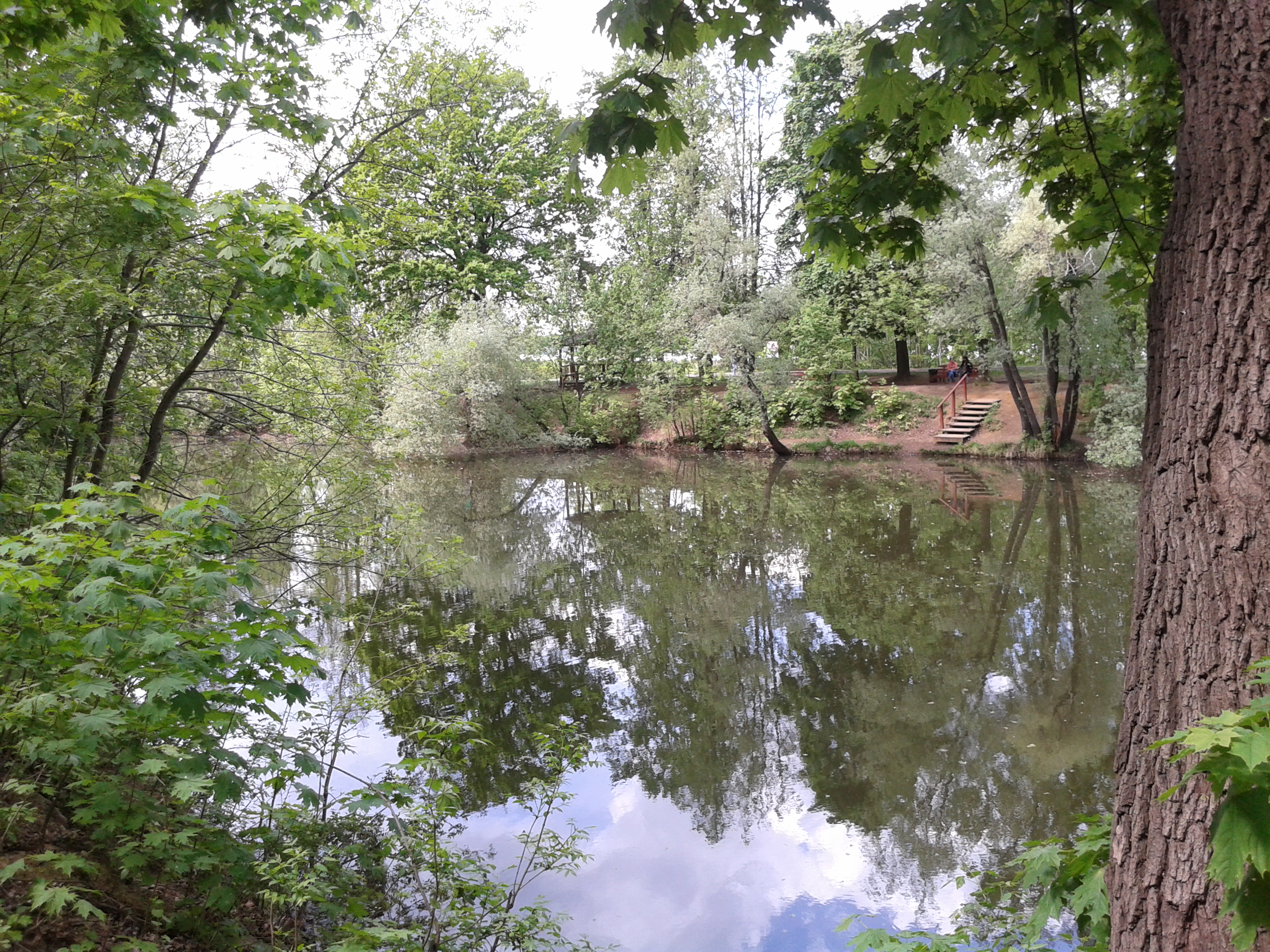 Природный заказник "Воробьёвы горы". Андреевские пруды